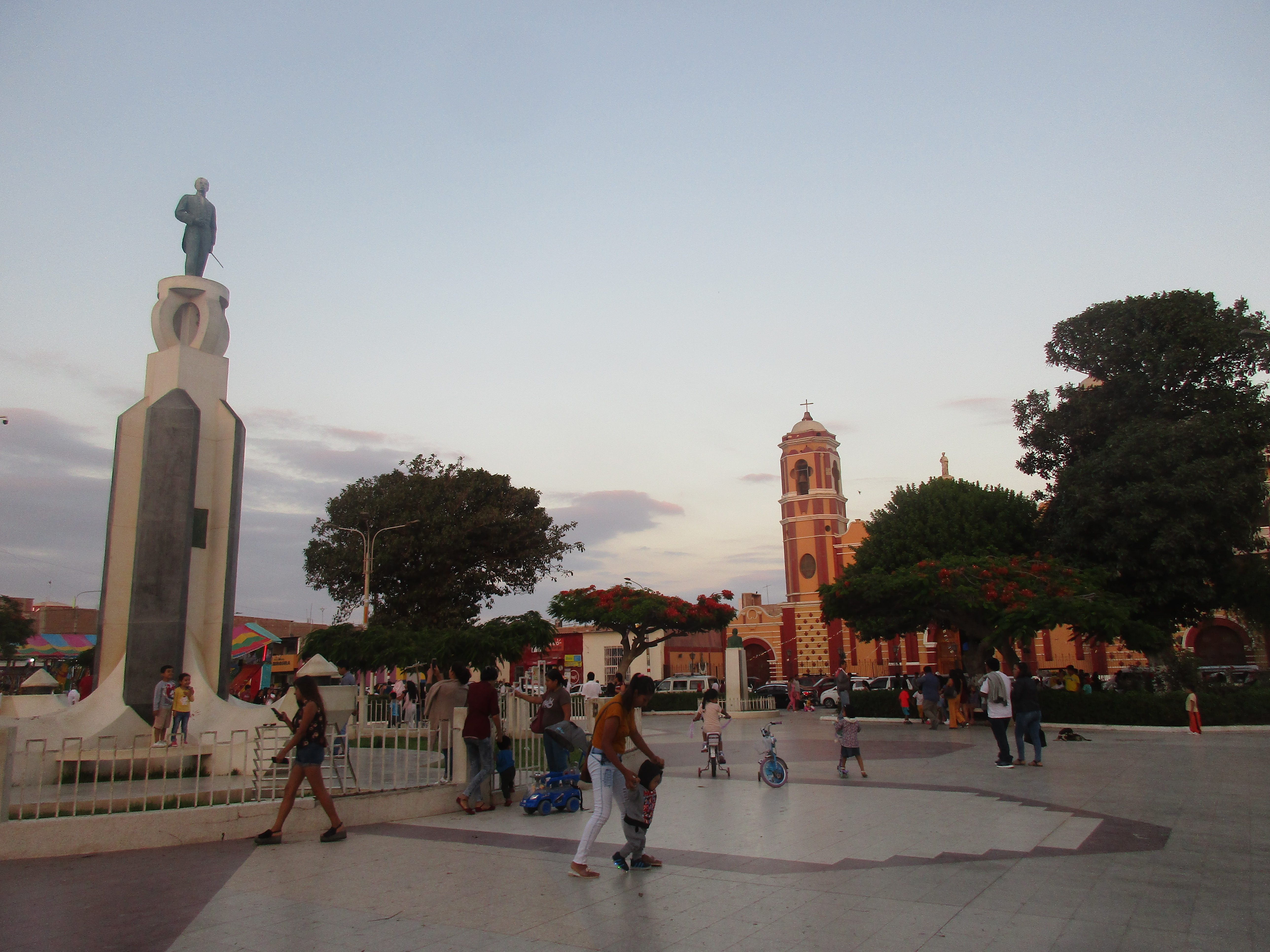 Plaza de Armas de Monsefú, Chiclayo en Perú.